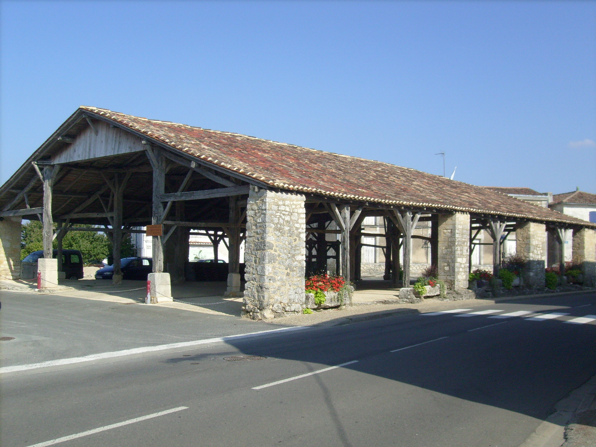 Halles de Pisany